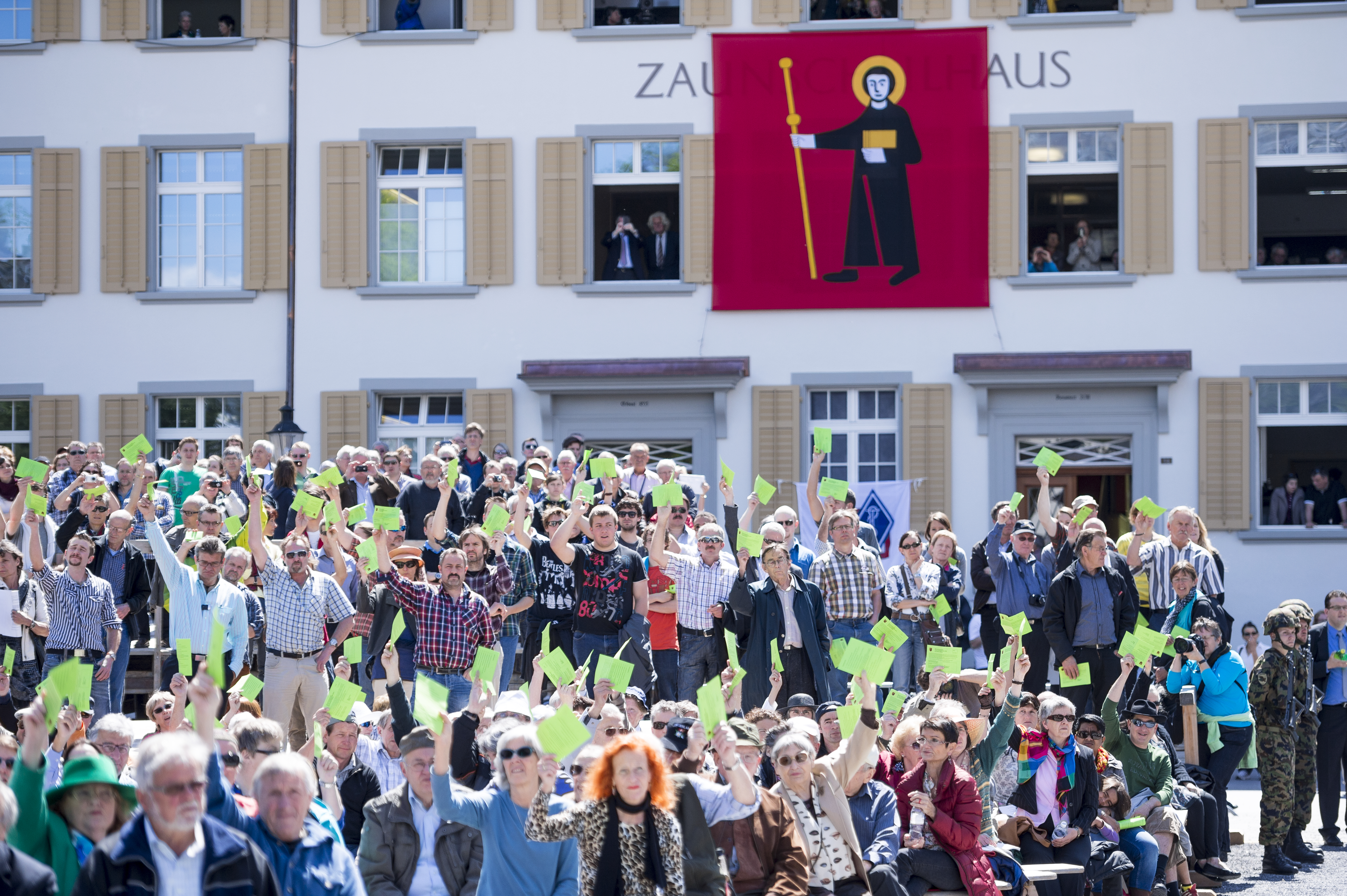 Landsgemeinde auf dem Zaunplatz in Glarus, Kanton Glarus